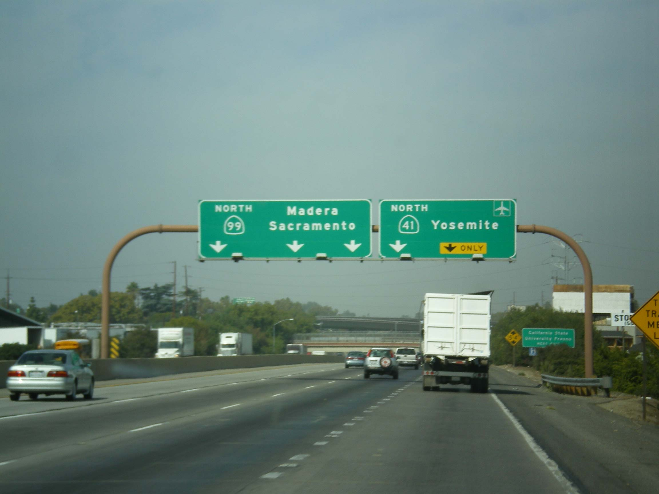 Die California State Route 99 (CA 99) in Fresno an der Kreuzung zur State Route 41 (CA 41) in Richtung Yosemite Nationalpark.